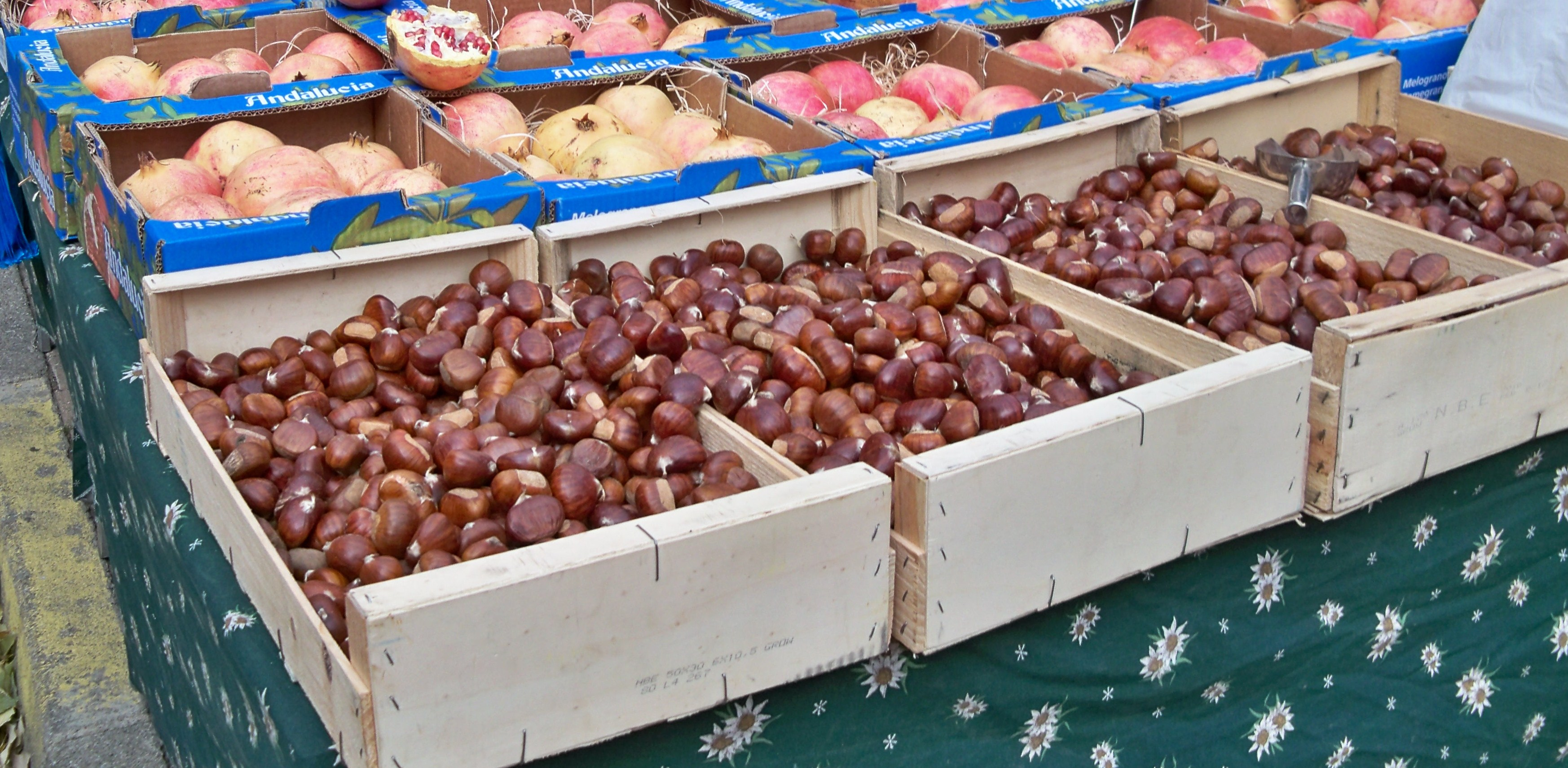 Chataignes en vente sur le marché d'Apt (Vaucluse, France)